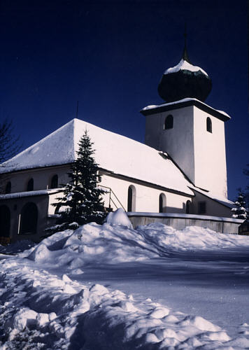 Dorfkirche von Wernersreuth